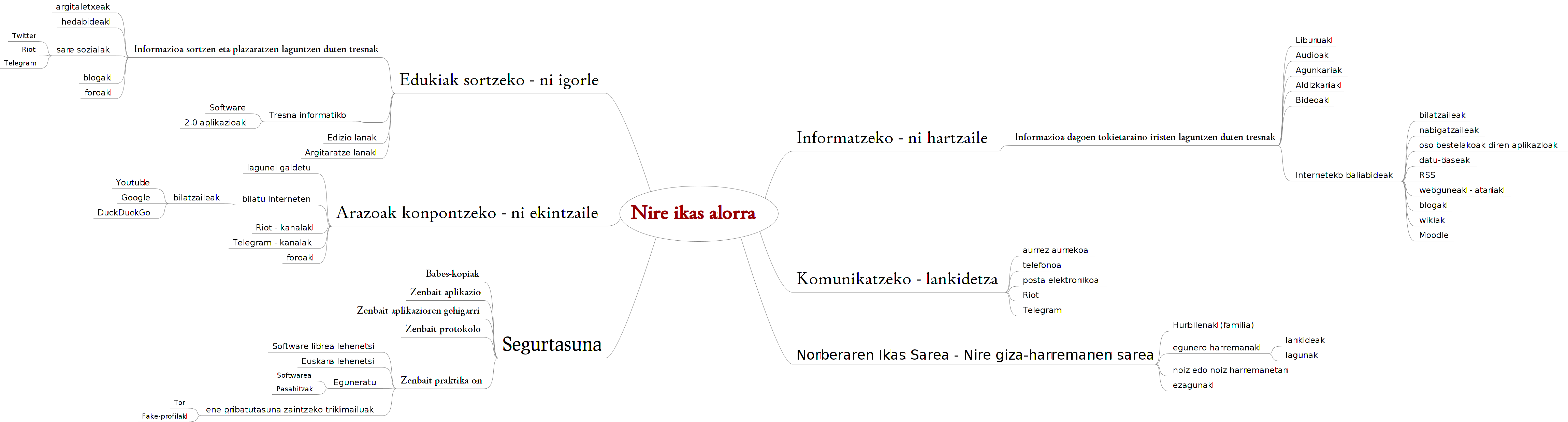 FreeMind softwarea erabiliz egindako kontzeptu mapa bat.